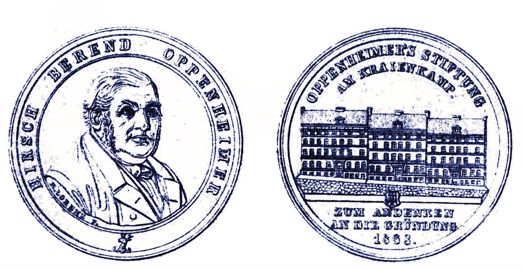 Medaille anlässig der Gründung der Oppenheimer-Stiftung im Jahre 1868 in Hamburg, Deutschland durch Hirsch Berend Oppenheimer (1793-1870)